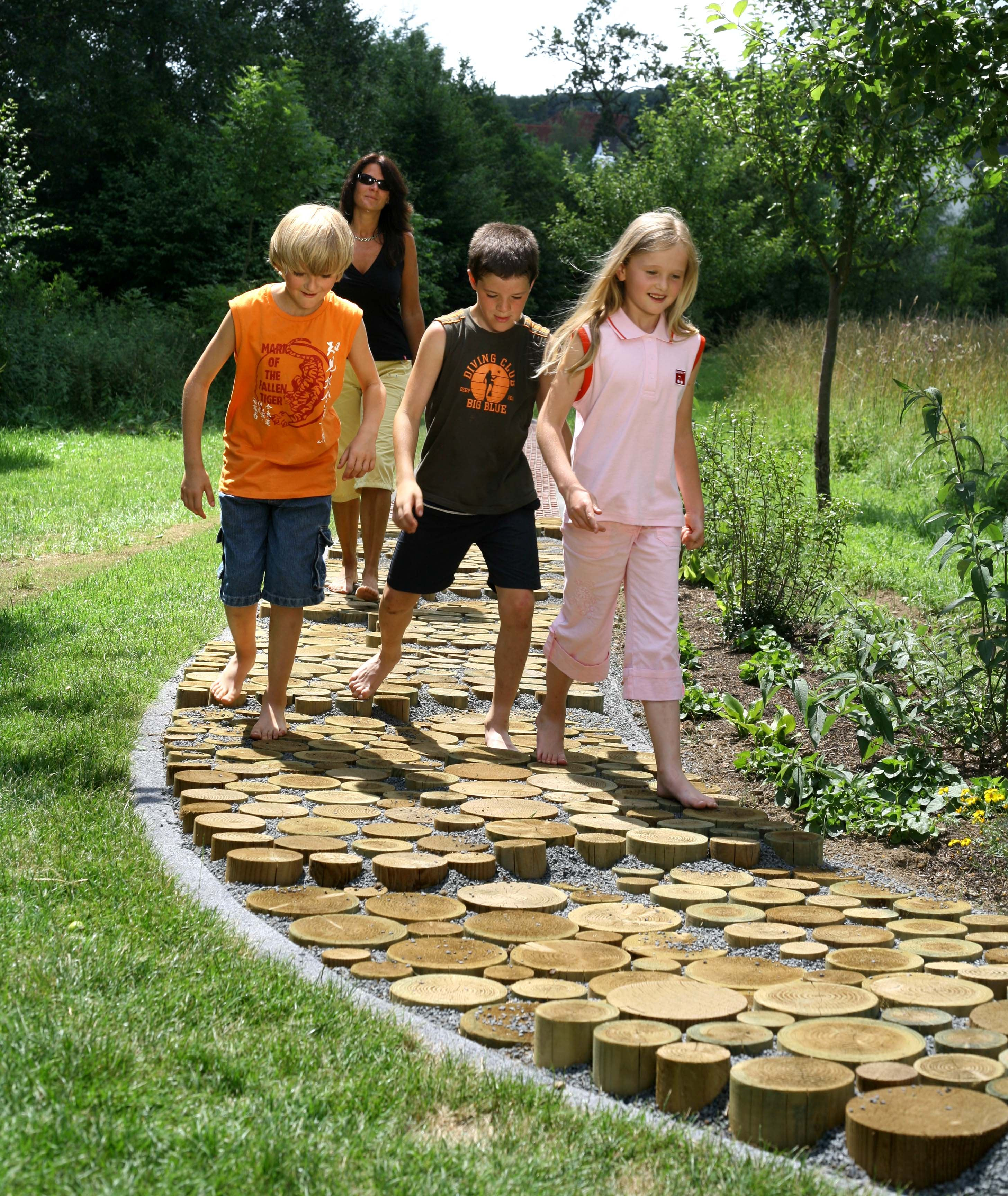 Familie auf dem Barfußweg